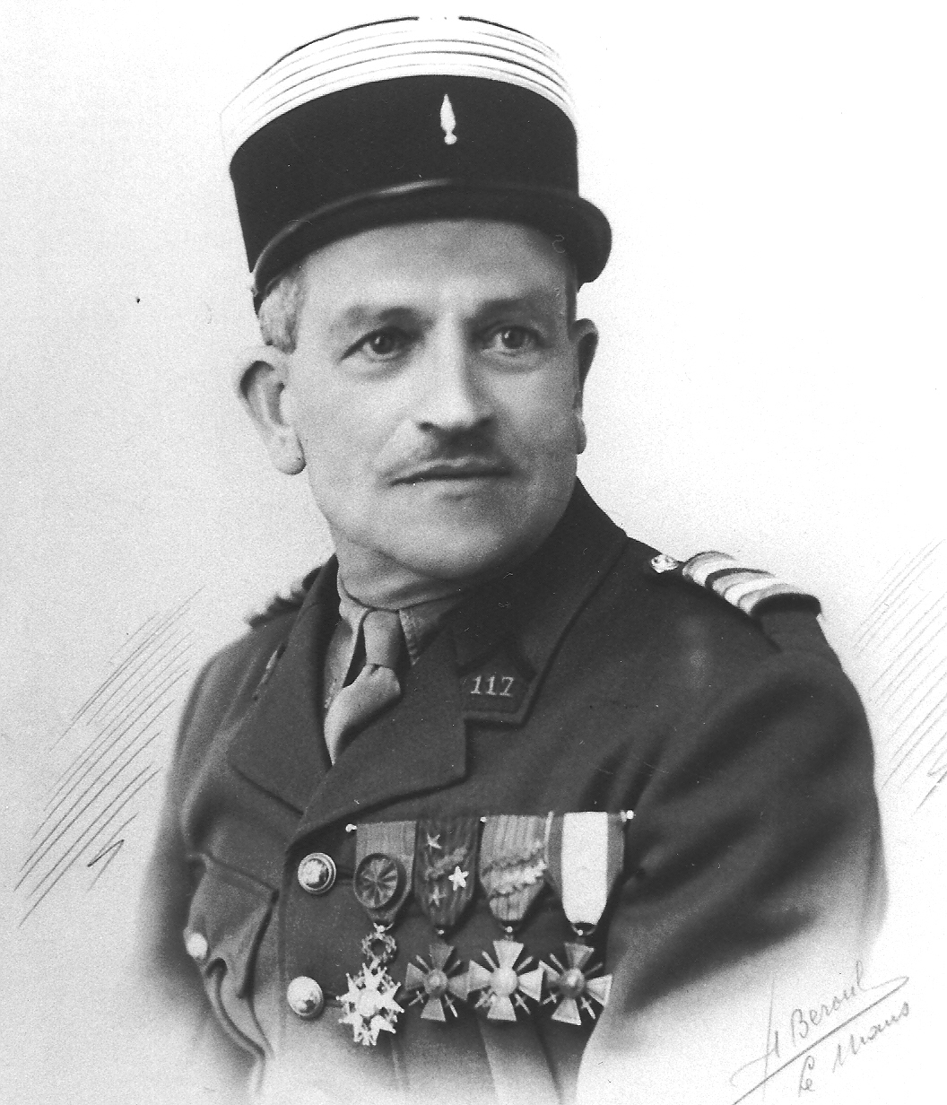 portrait colonel Brébant